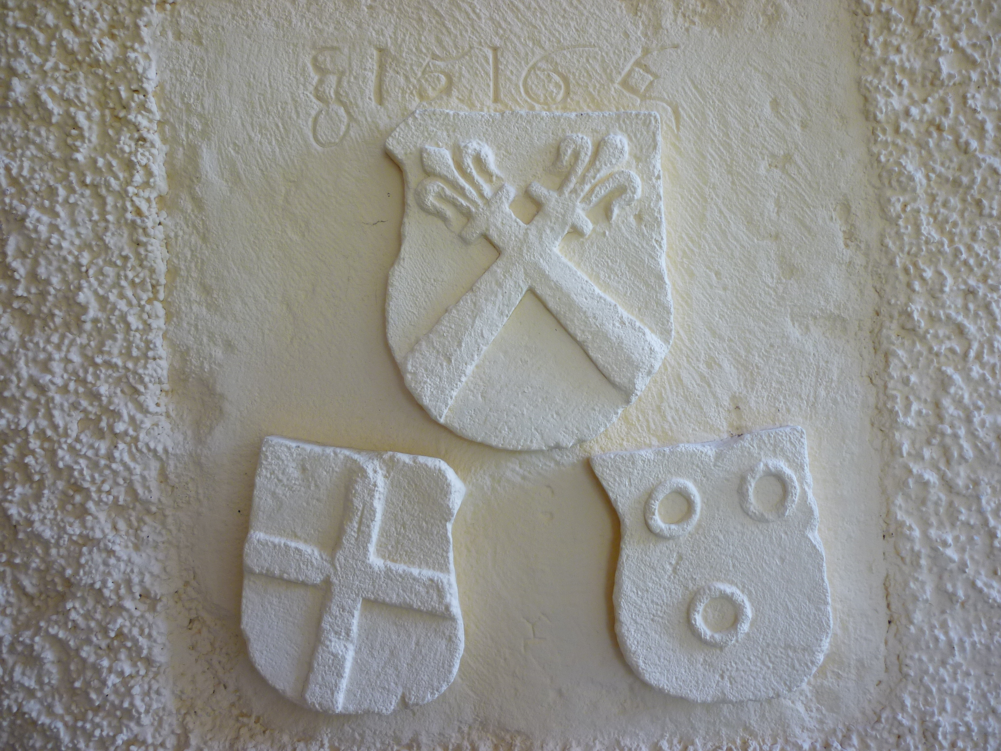 Wappentafel der alten Kirche von Oberkirch SO, Schweiz